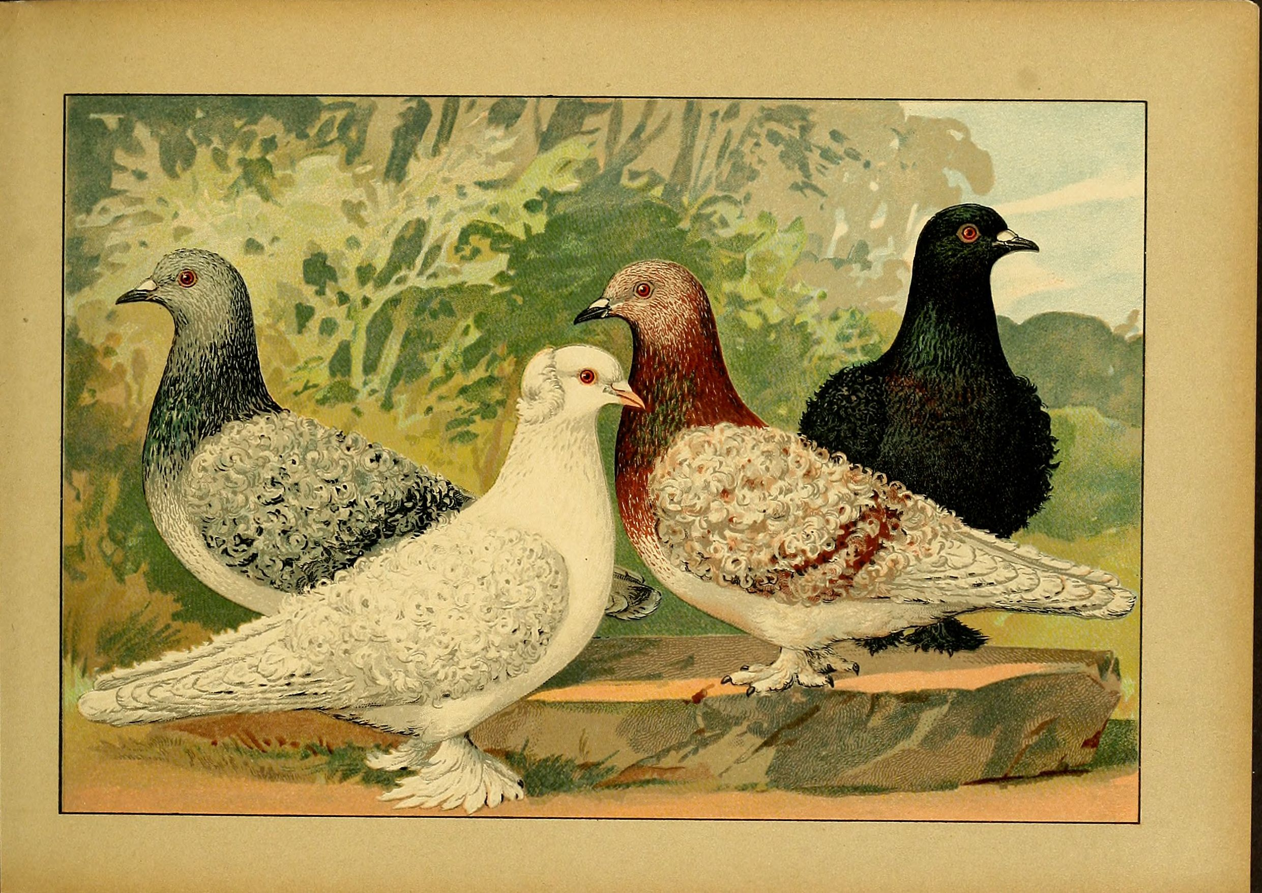 Deutsch